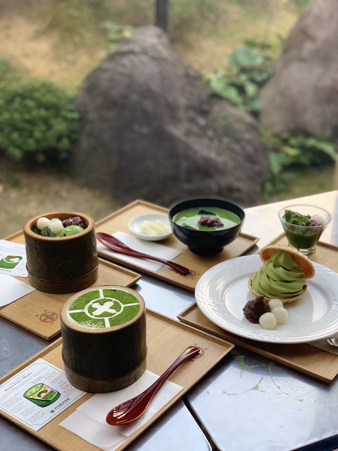 京都抹茶。